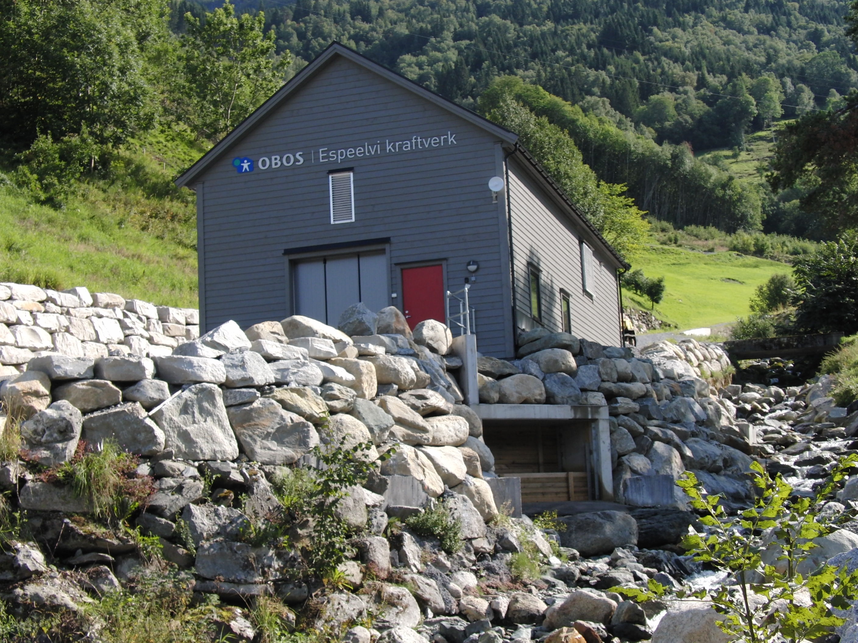 Espeelvi kraftverk